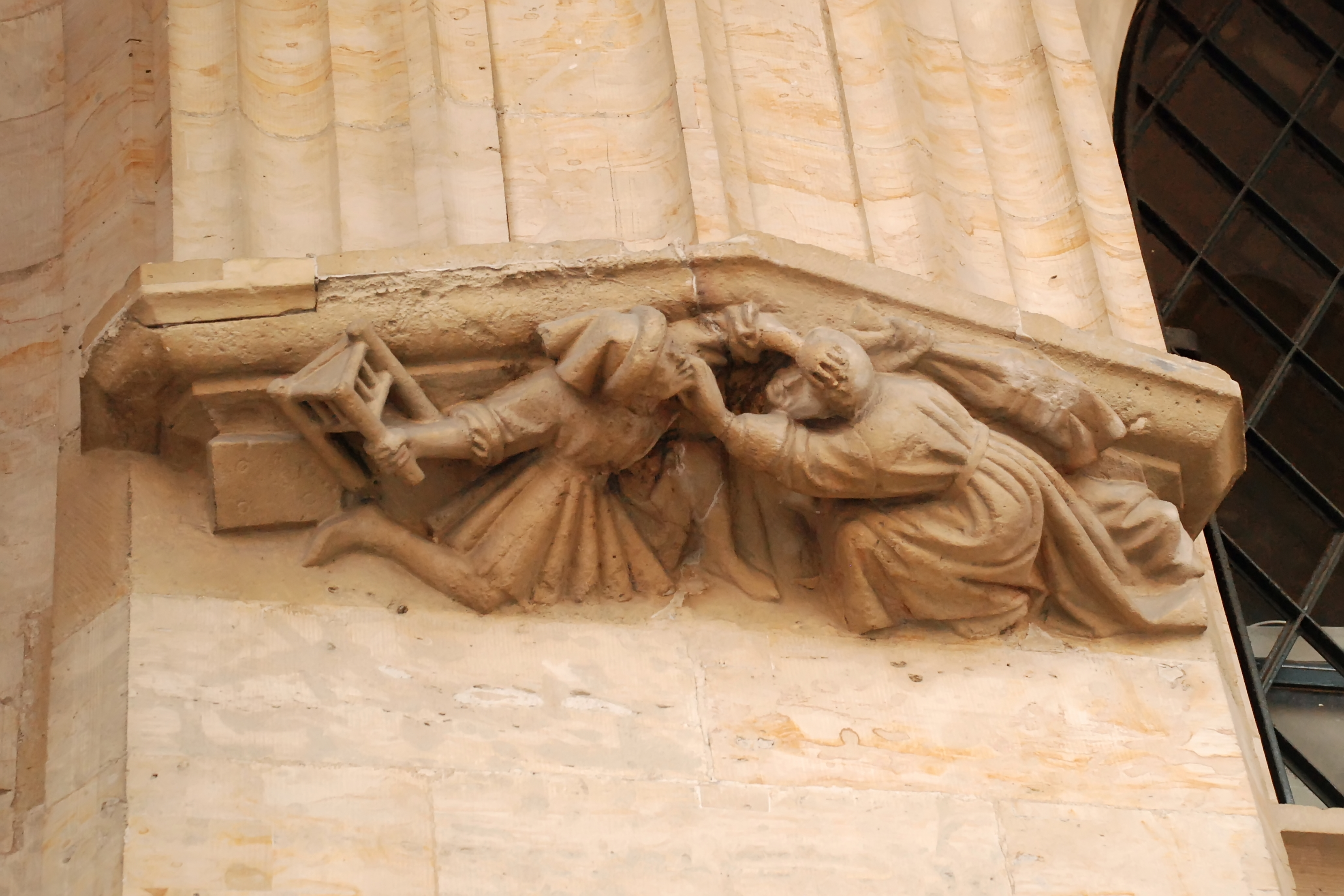 Belgique - Bruxelles - Grand-Place - Hôtel de ville - Maison de l'Estrapade